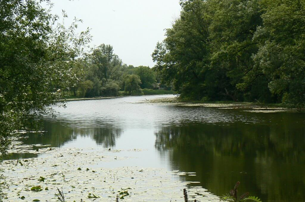 Bošnjački Vjerovi